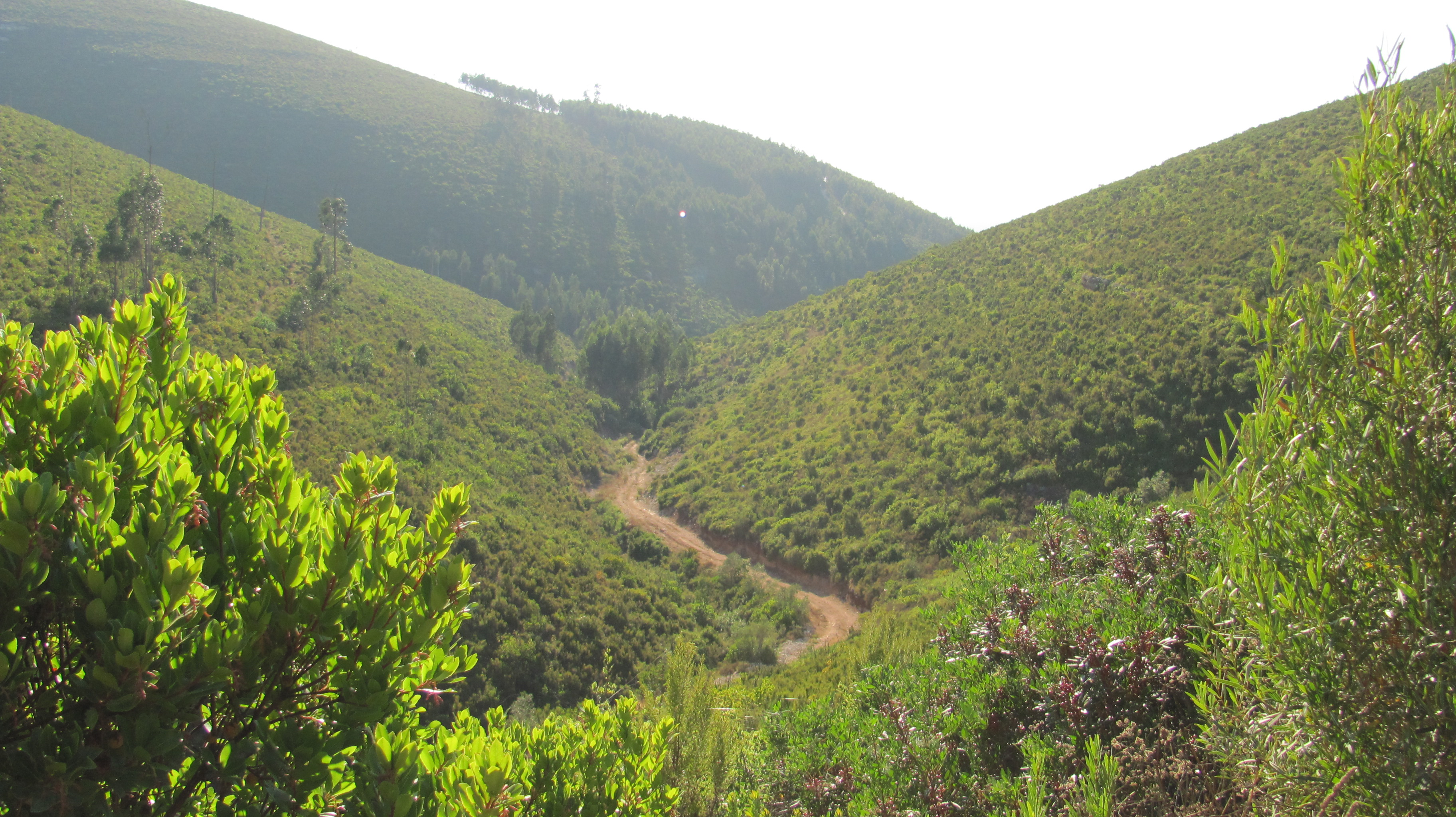 Vue d'un vallon dans le massif de la Dame du Mont.